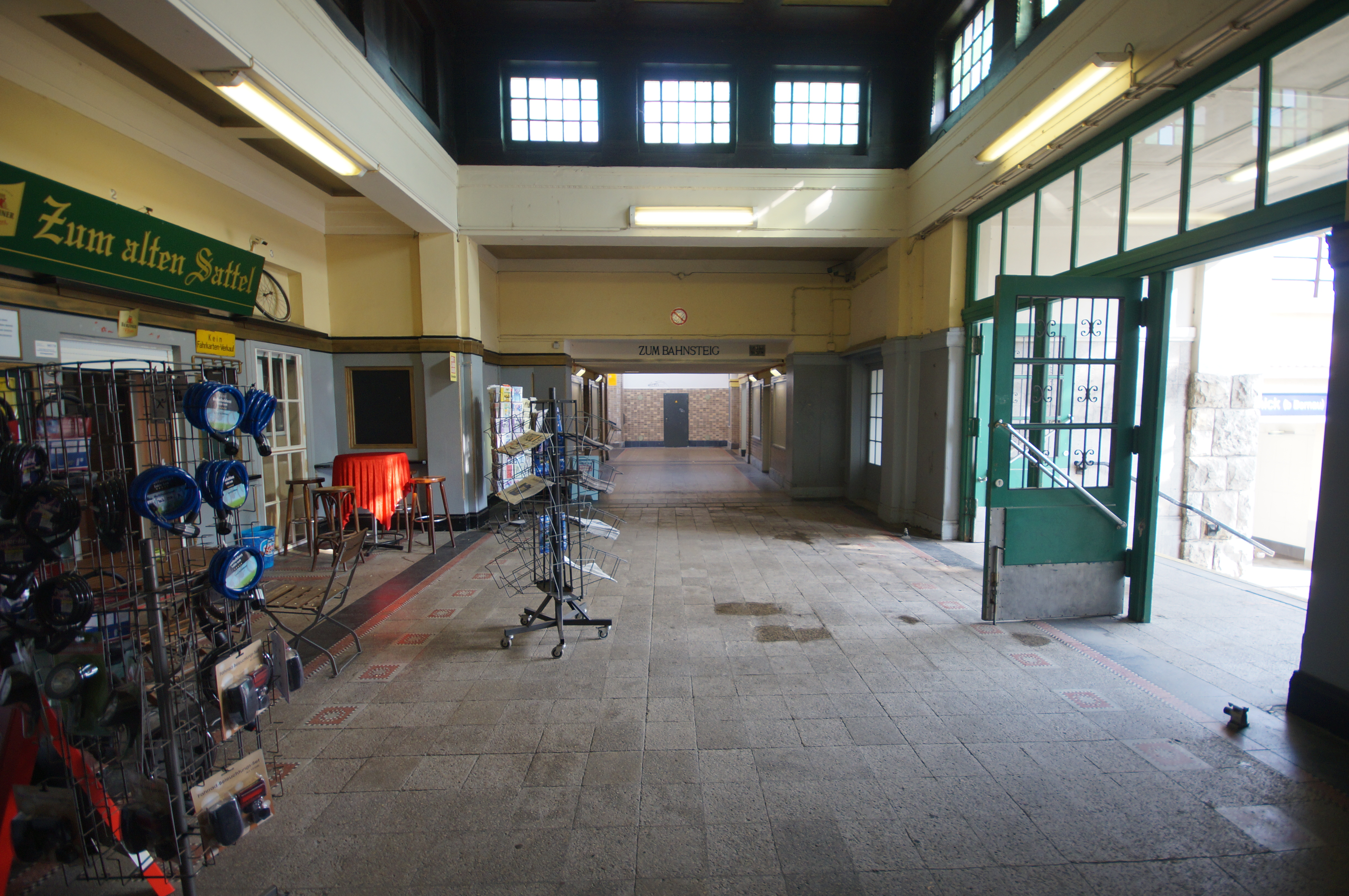 Haupthalle des Bahnhofs Zepernick (b Bernau) in Panketal in Brandenburg bei Berlin